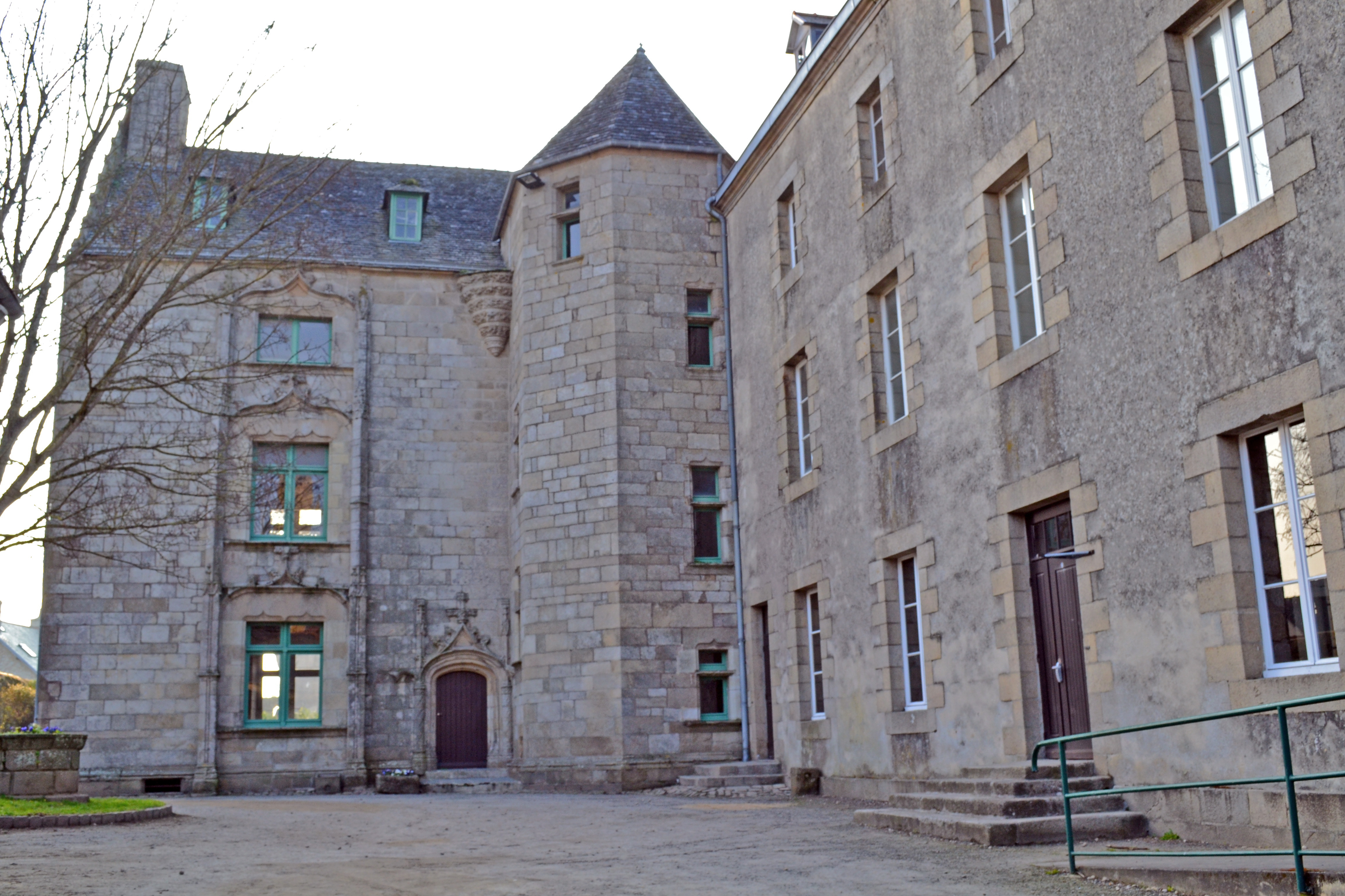 Manoir de Kéroulas à Saint-Pol-de-Léon.